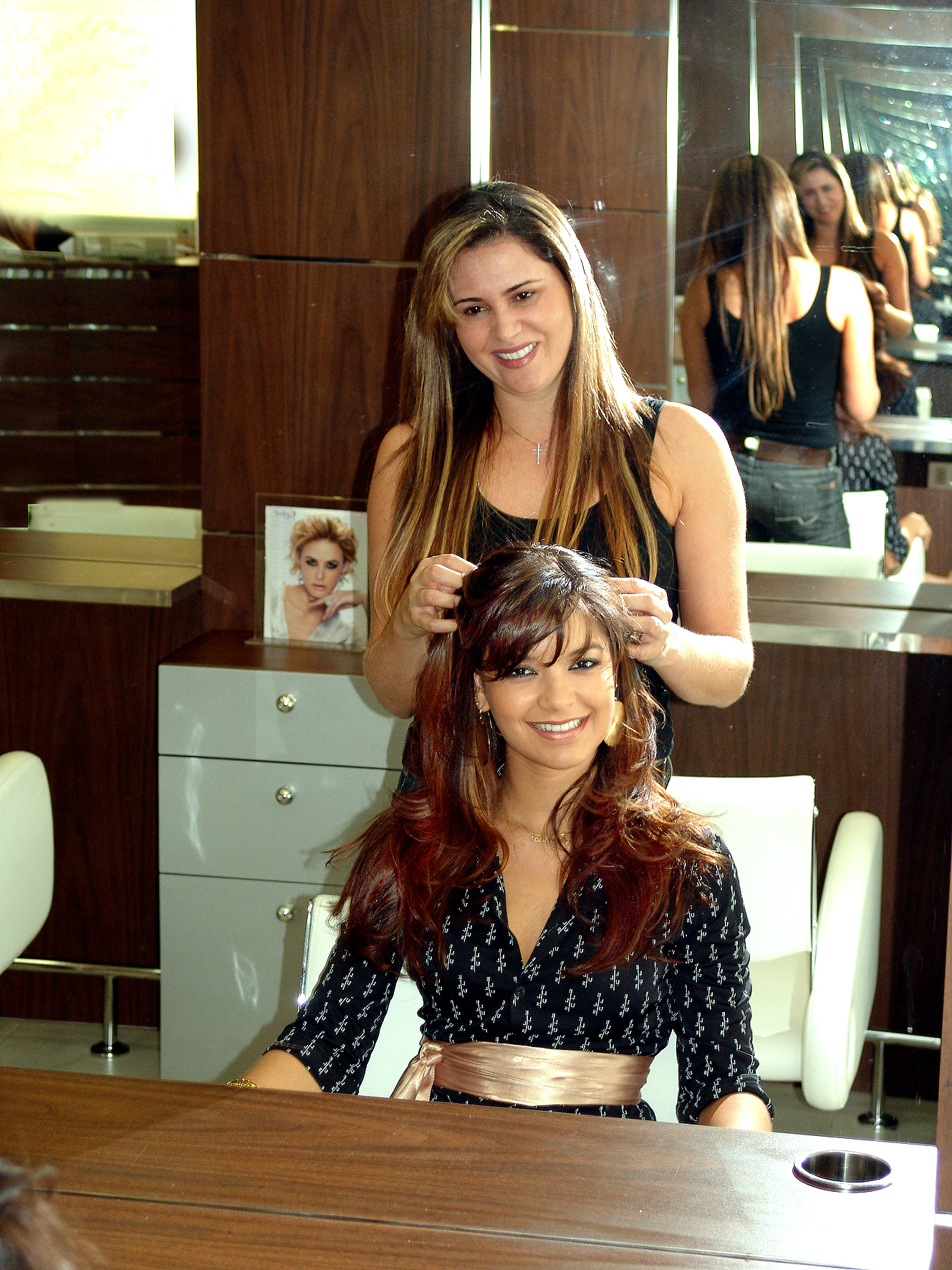 Amanda Françozo